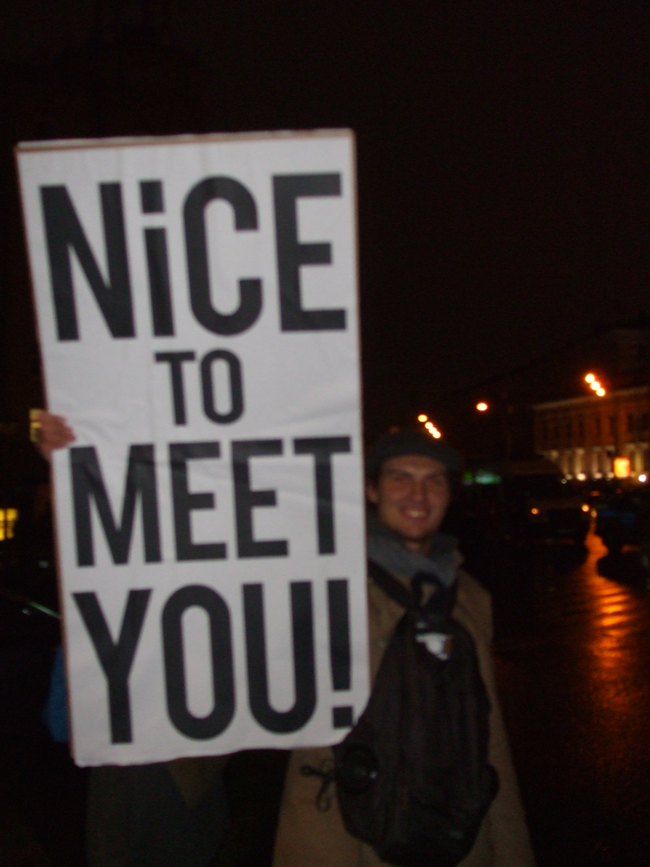 Конец митинга на Болотной площади 10 декабря 2011